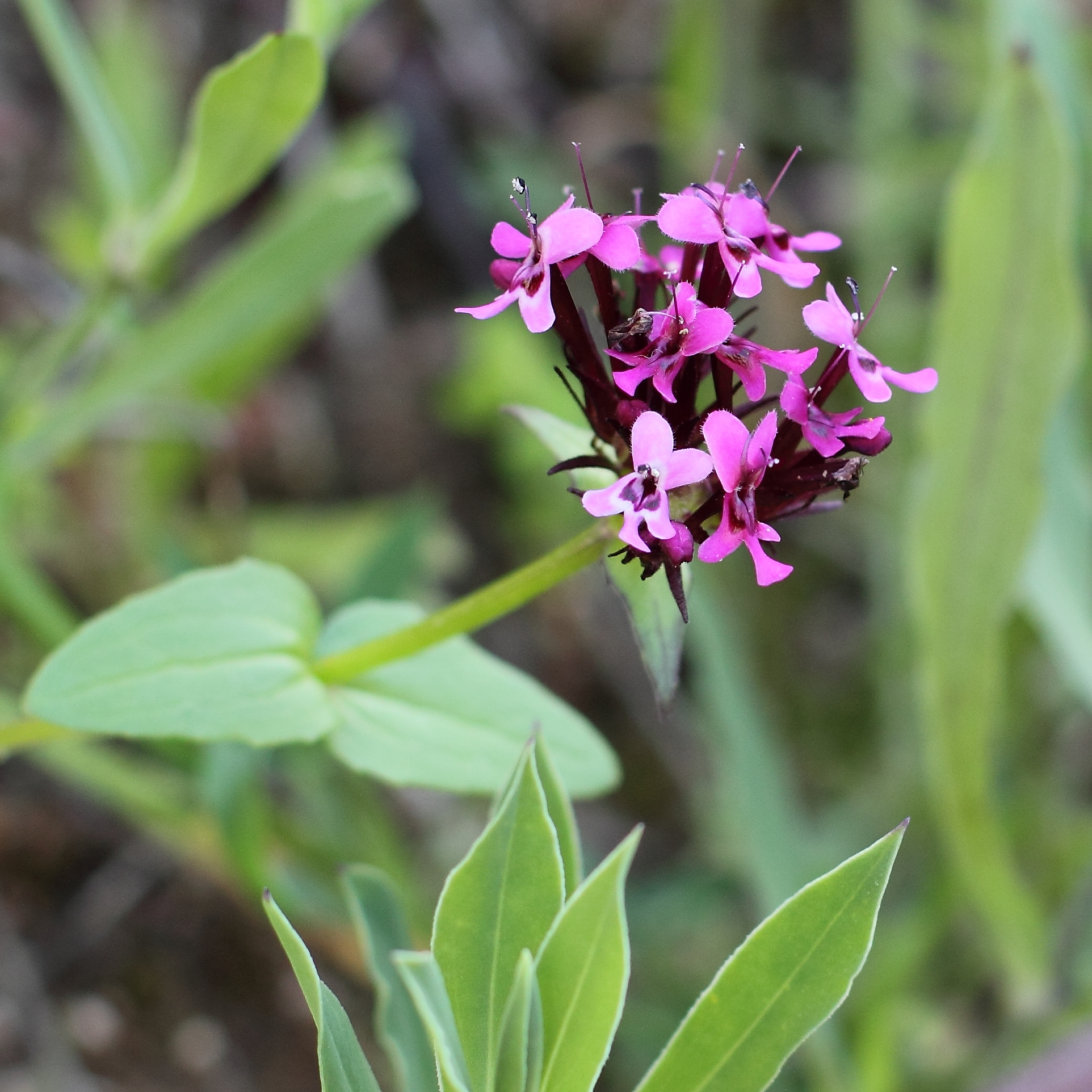 Reino Plantae Filo Magnoliophyta Classe Magnoliopsida Ordem Dipsacales Família Caprifoliaceae Género Fedia Nome Comum alface-de-argel, cornucópia